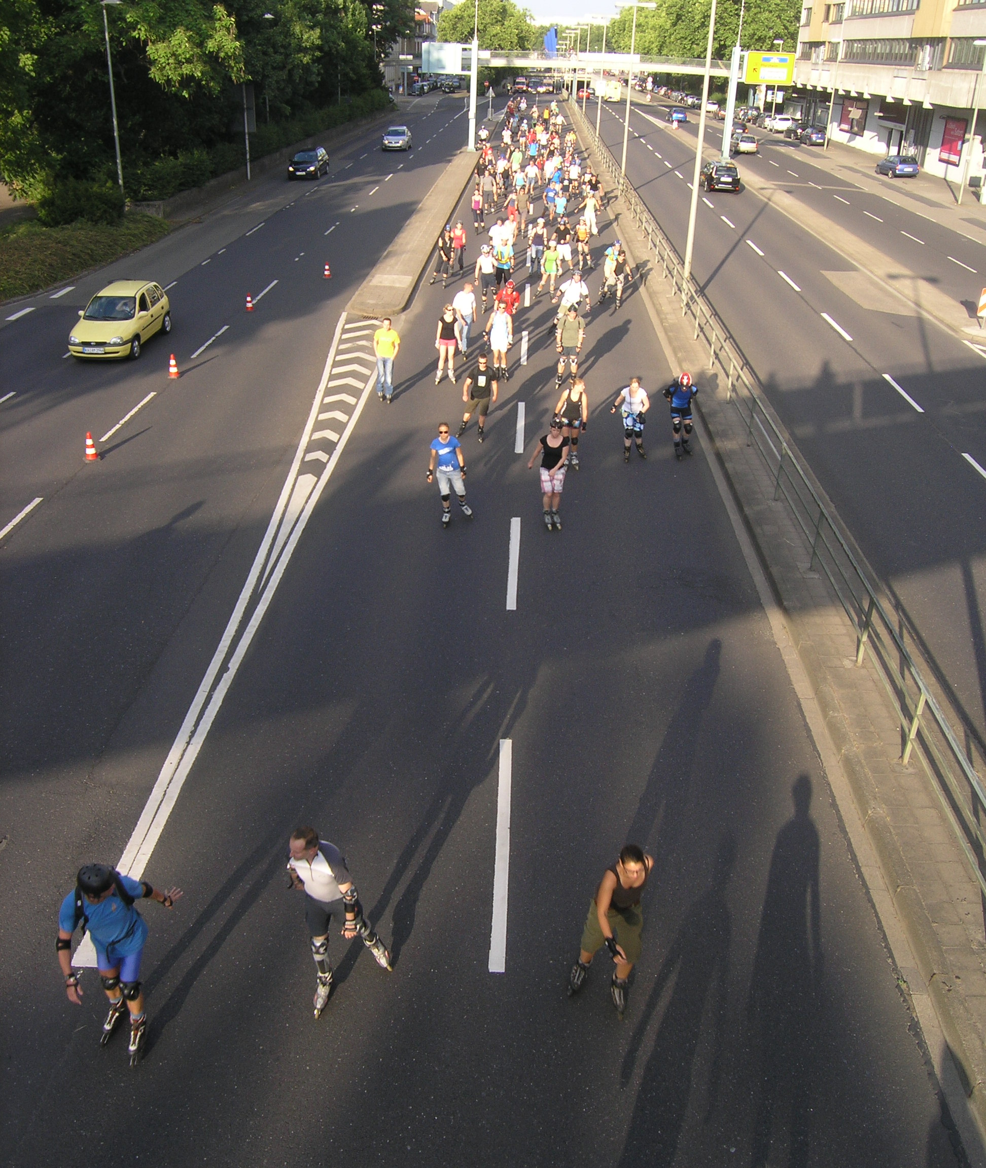 Karlsruher SkateNite, Teilnehmer